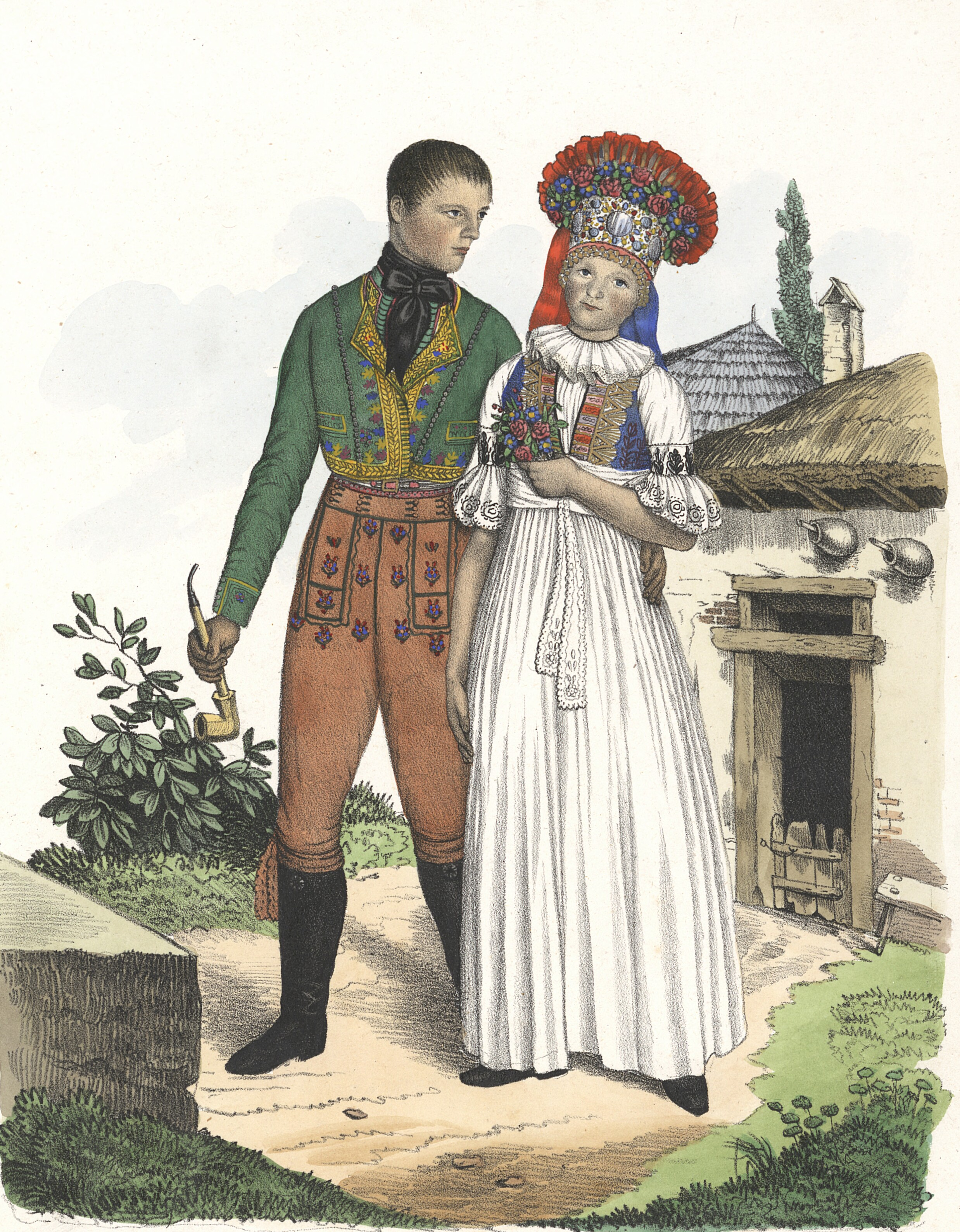 Grafika z knihy Mährens ausgezeichnete Volkstrachten z roku 1837 zachycující mladý hanácký pár z tovačovského panství.